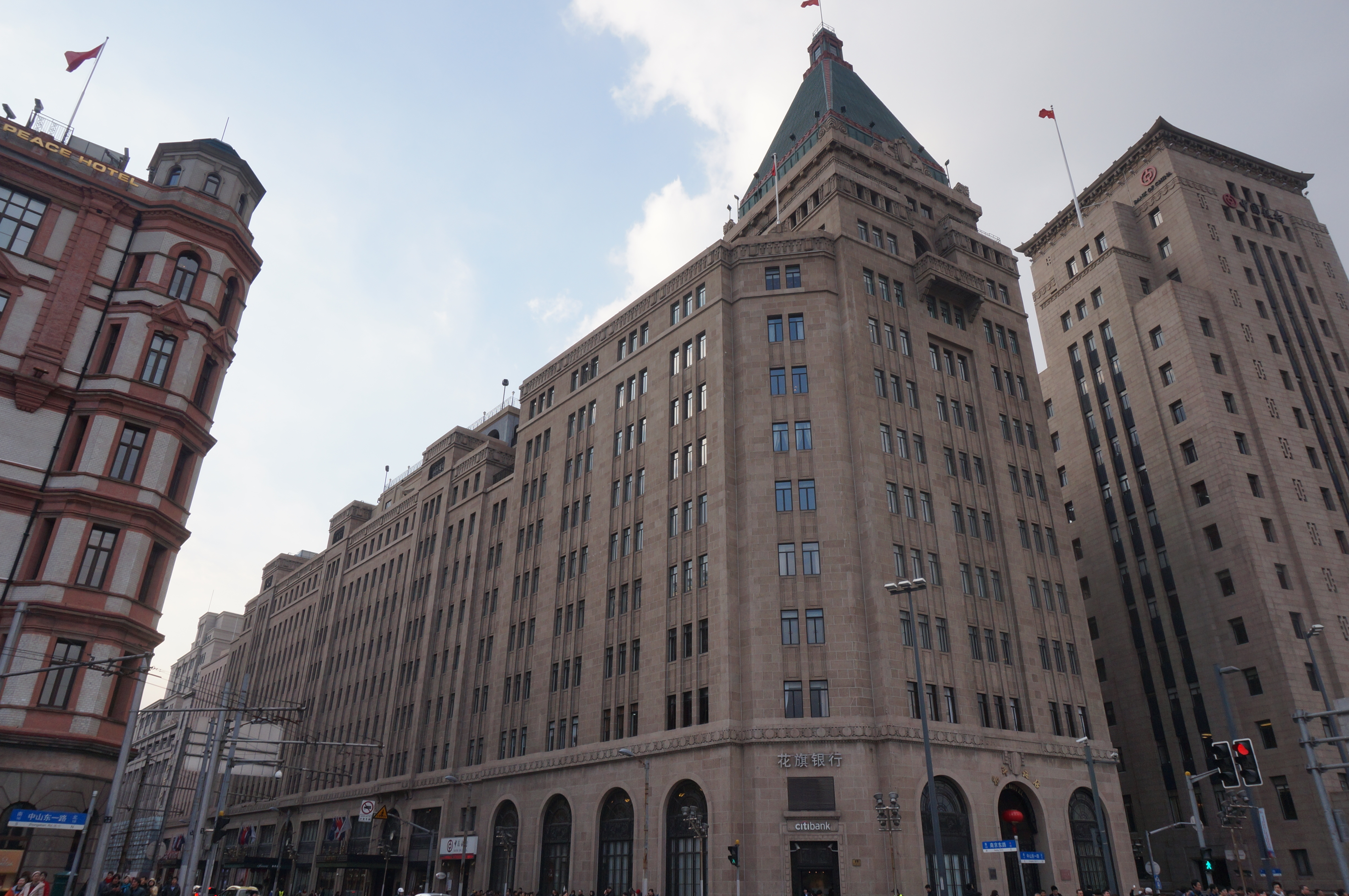 外滩沙逊大厦